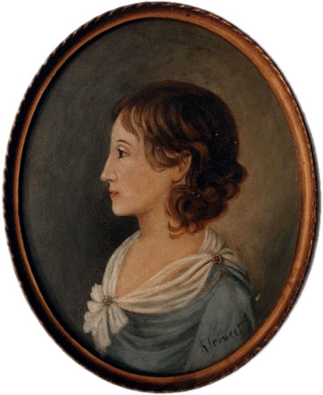 Portrait of Christiane Wilhelmine Sophie von Kühn (* 17 März 1782, † 19 März 1797)